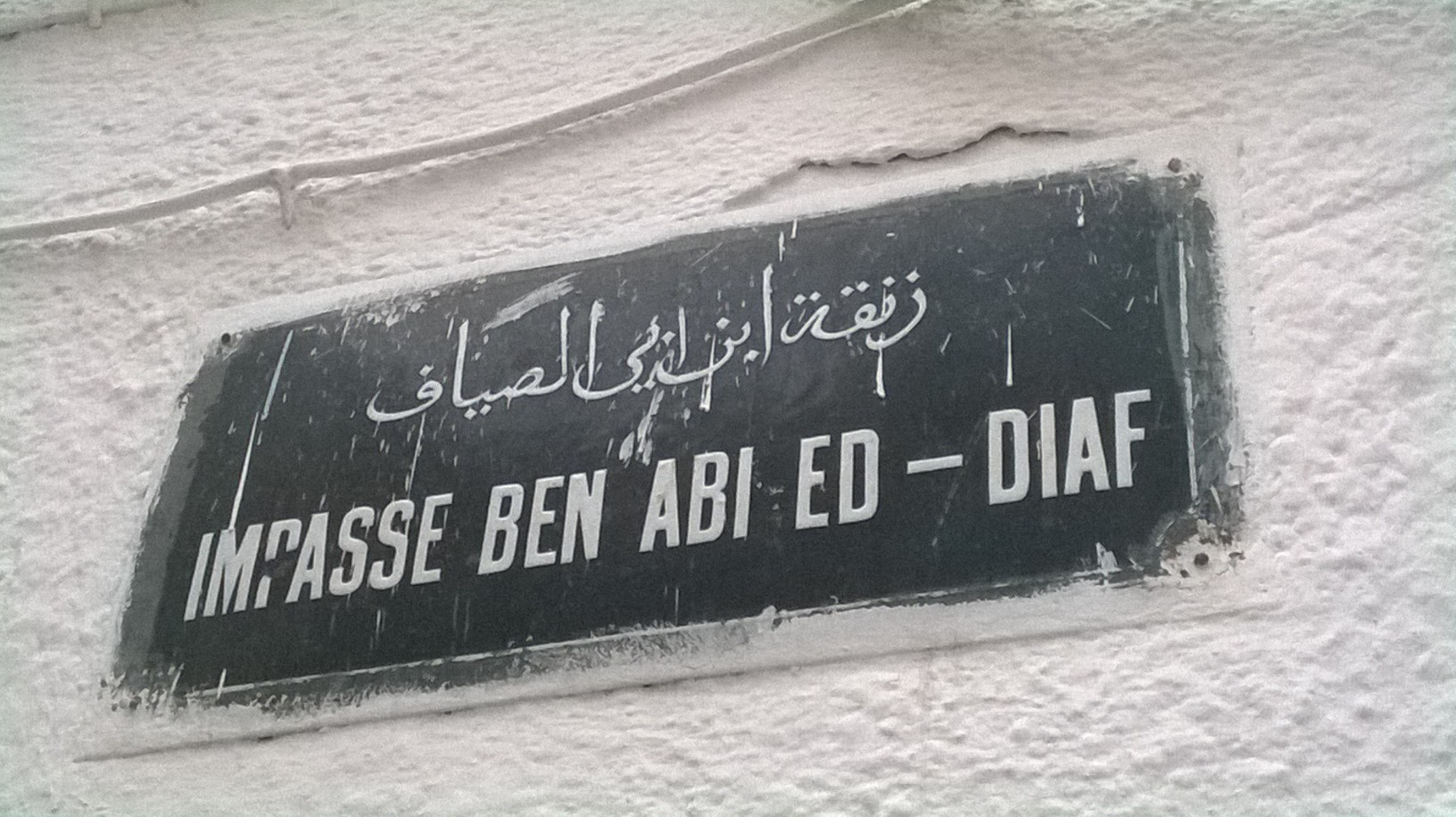 La médina de Tunis مدينة تونس العتيقة